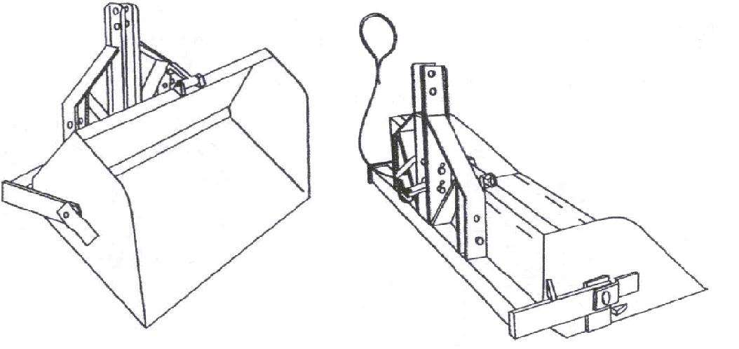 disegno di pala posteriore portata